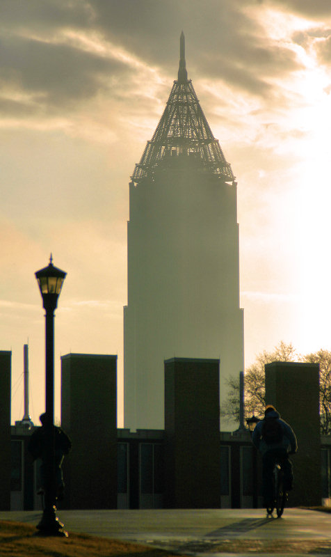 Morgensonne auf dem Campus des Georgia Institute of Technology.